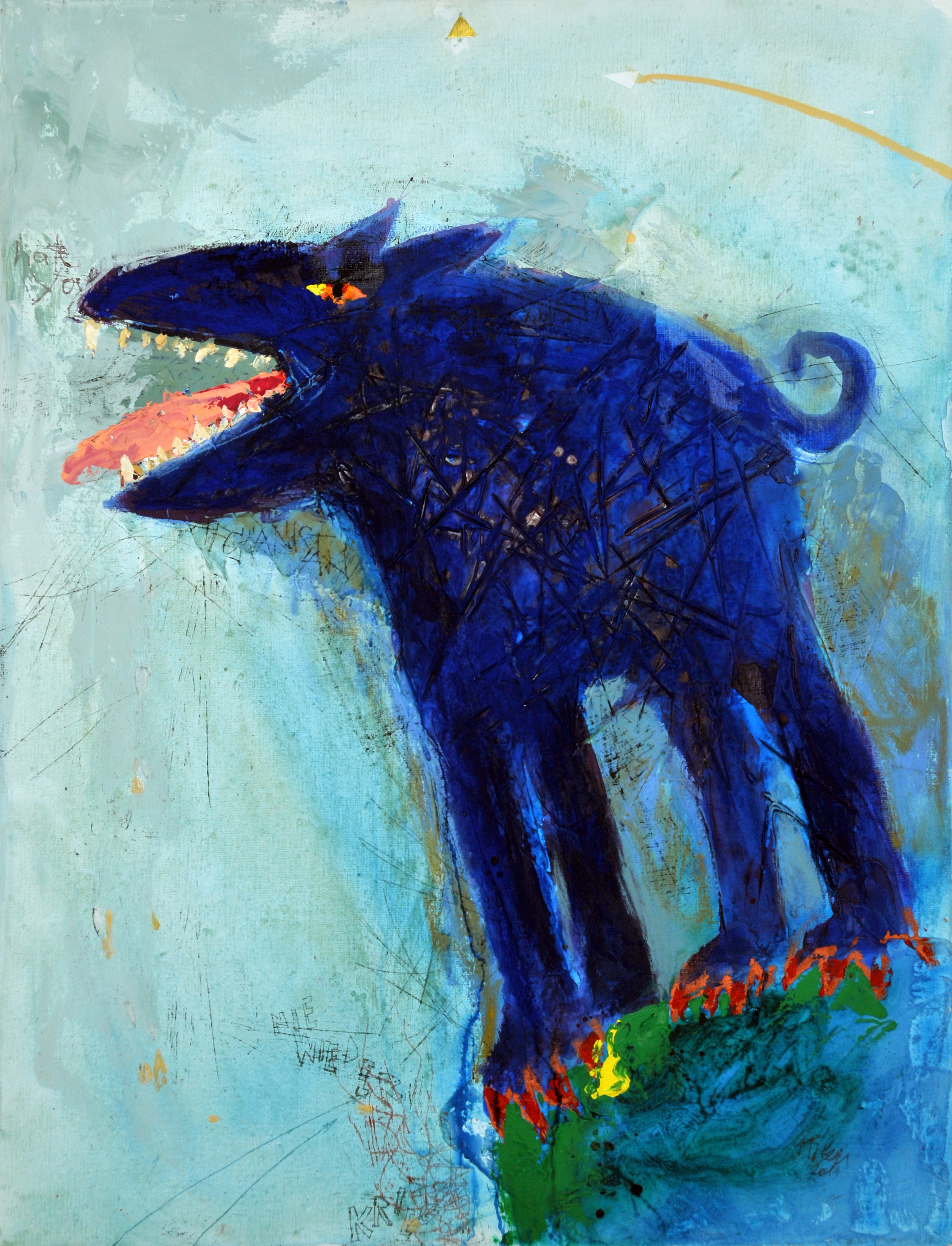 Adi Holzer verurteilt bestialisches Handeln. Er steigert die Gefährlichkeit dieser Bestie durch den Namen "Die große Bestie", durch die Farbgebung und durch die Flammen, die aus den Fußsohlen der Bestie schlagen. Adi Holzer erlebte in seiner Kindheit die Bestialität des zweiten Weltkrieges und schreibt neben die große Bestie seine ablehnenden Worte "hate you" ("Ich hasse dich") und "Nie wieder Krieg". Am Himmel hinterlässt eine Atomrakete ihre weiße Spur. Über allem steht als Zeichen der Anwesenheit Gottes das goldene Dreieck für die Dreieinigkeit von Gottvater, Gottsohn Jesus Christus und Heiliger Geist. Dieses Zeichen der Anwesenheit Gottes findet sich seit Jahrzehnten auf jedem Bild von Adi Holzer.